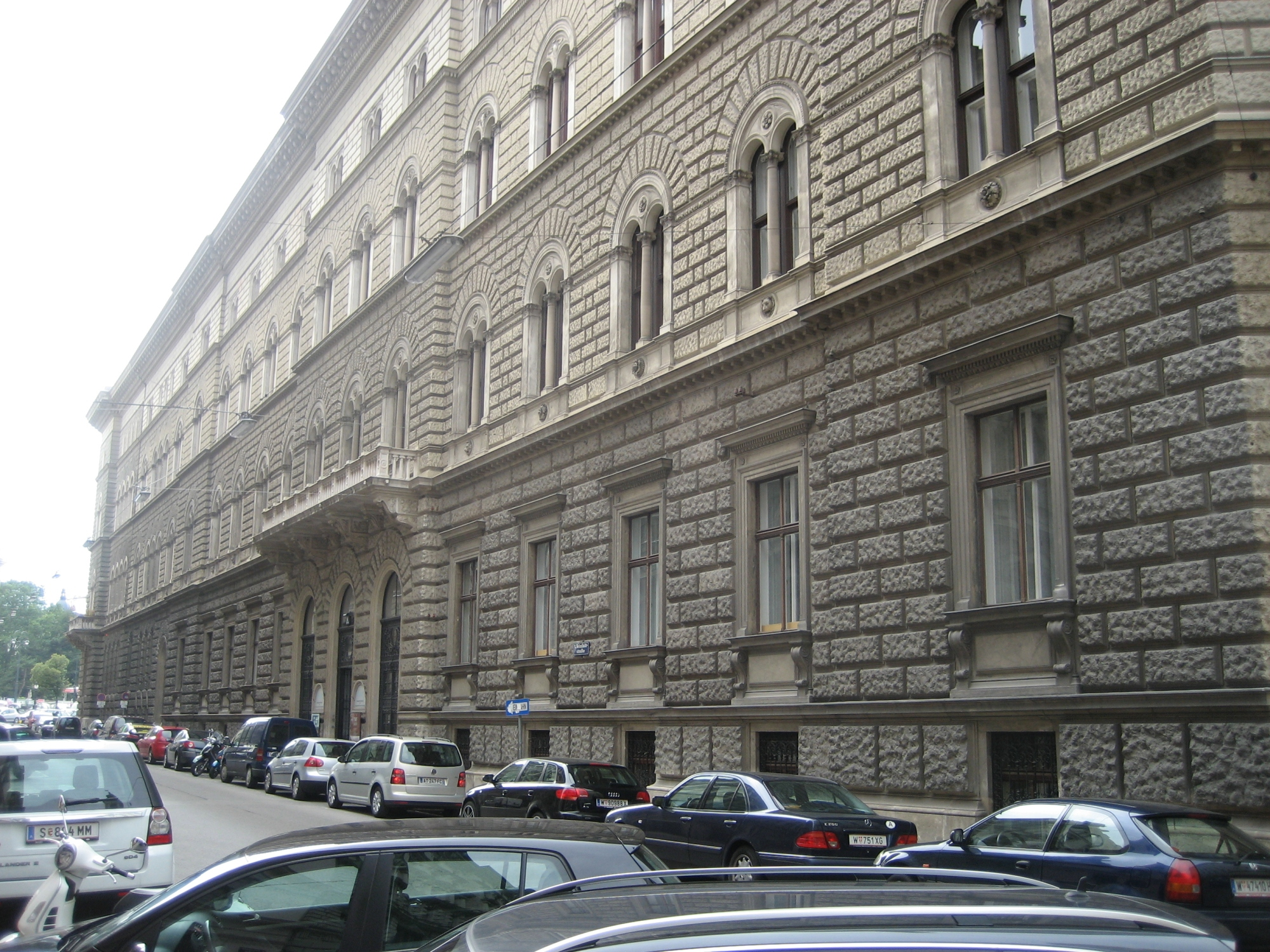 das Haus Teinfaltstraße 8 im 1. Bezirk, in Wien